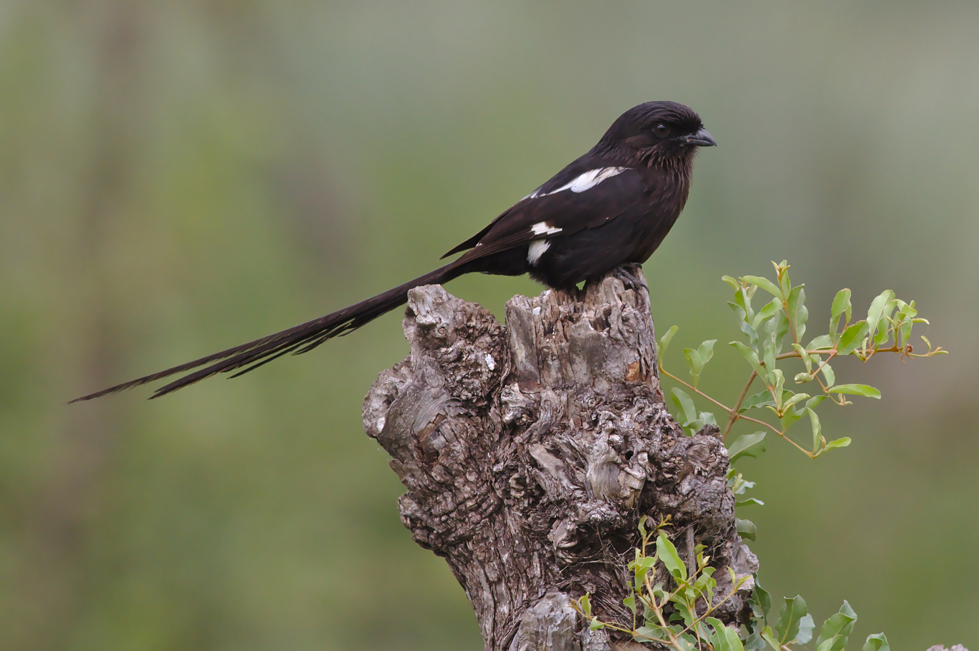 Magpie shrike, Urolestes melanoleucus, at Kruger National Park